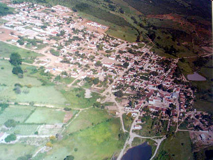 Vista Aérea de Guajeru